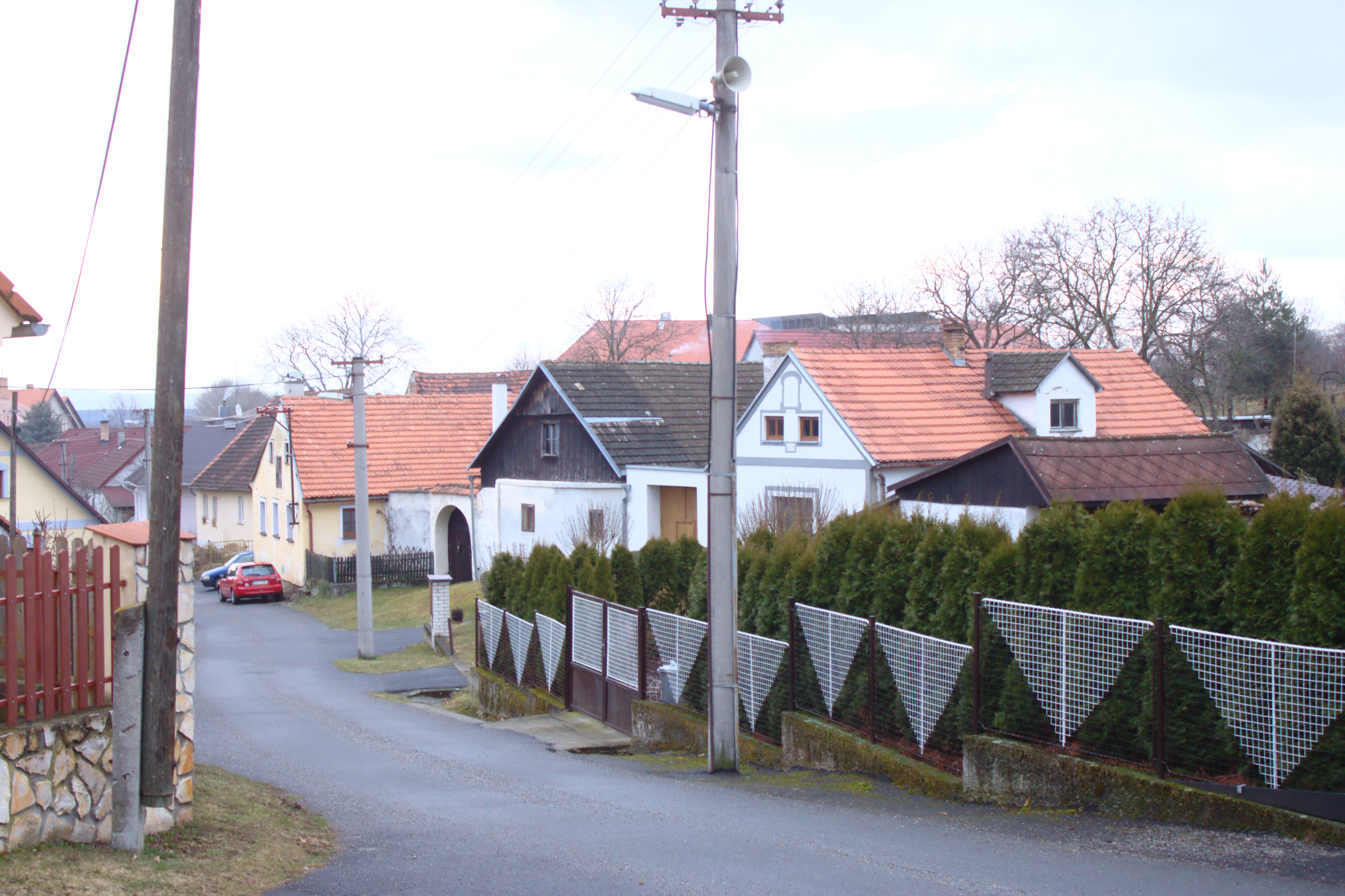 Domy v obci ve vesnici Chvalovice Project: Fotíme Česko